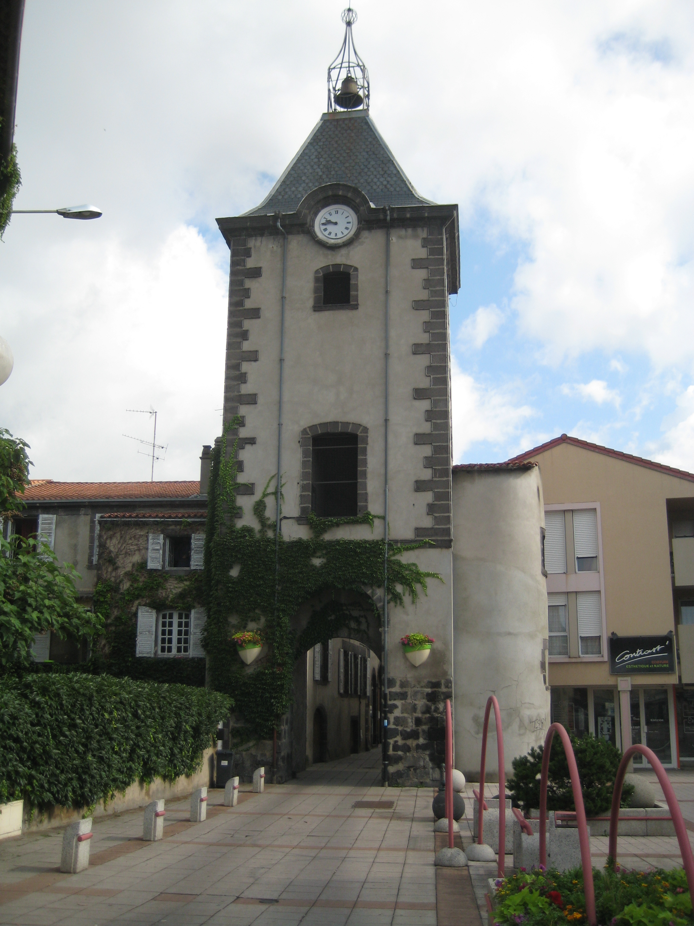 Tour de l'horloge/Beffroi de Cébazat .